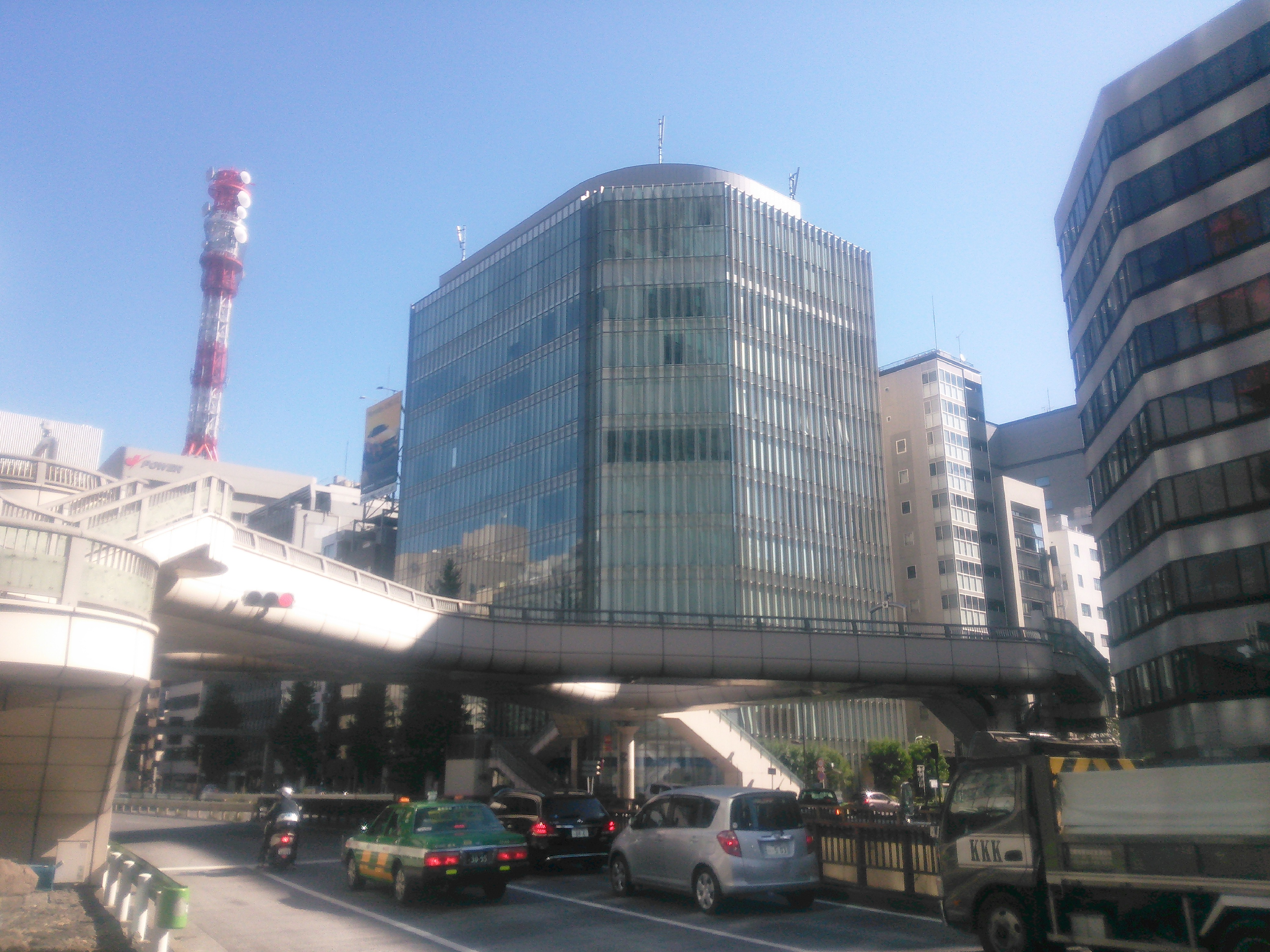 東京都中央区銀座7丁目、日土地銀座ビル